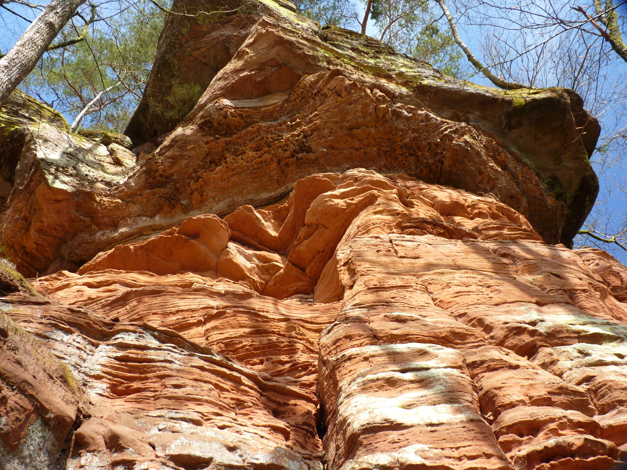 Rötlicher Sandstein der Altschlossfelsen im April 2015